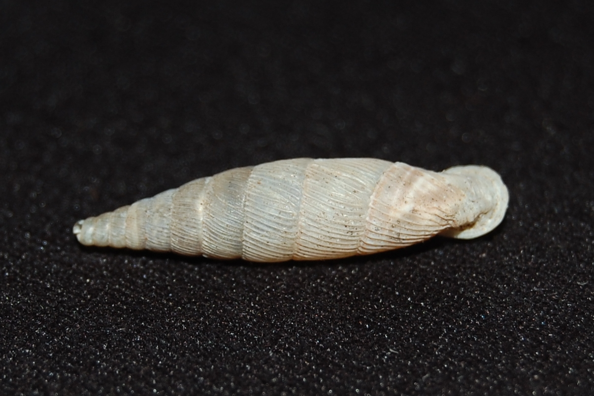 Siciliaria grohmanniana